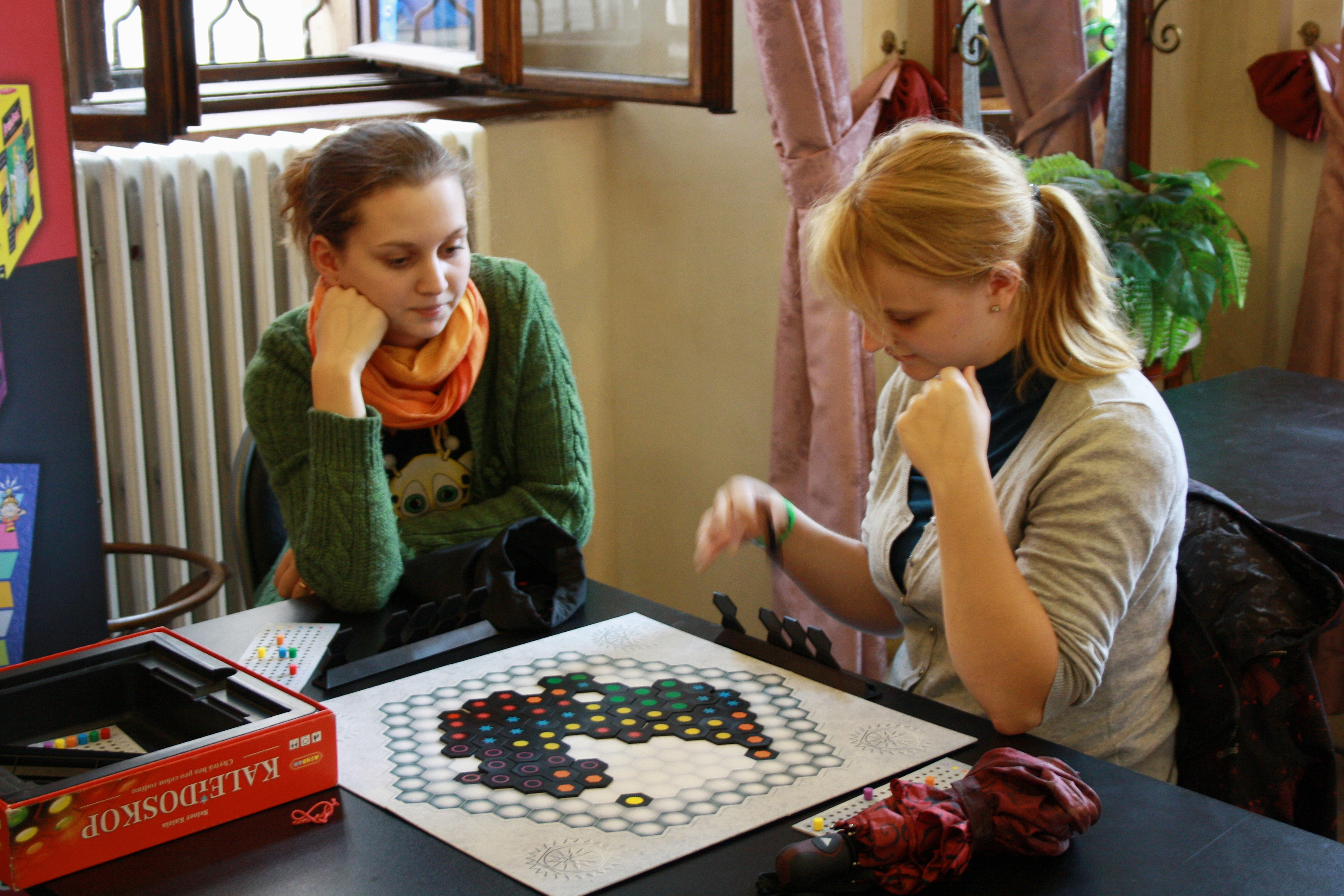 Deskohraní 2012 - Kaleidoskop